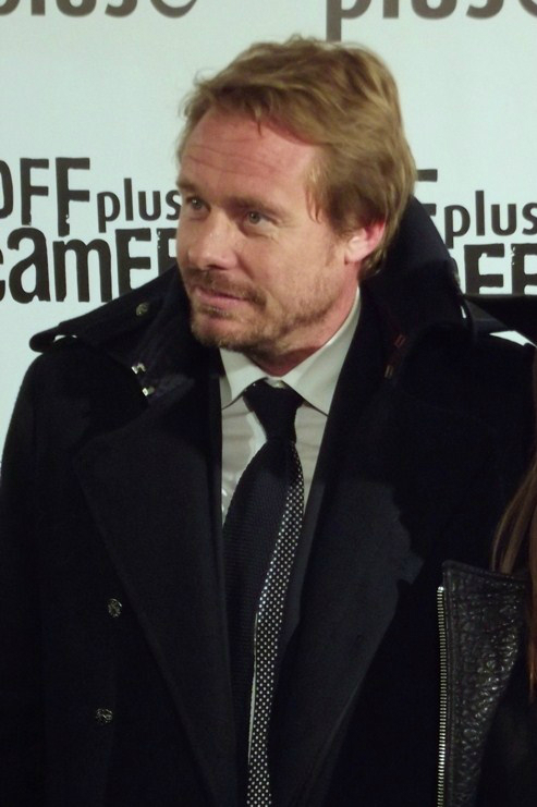 Holenderski producent telewizyjny Rinke Rooyens. Zdjęcie zrobione podczas 6. edycji międzynarodowego festiwalu kina niezależnego Off Plus Camera.